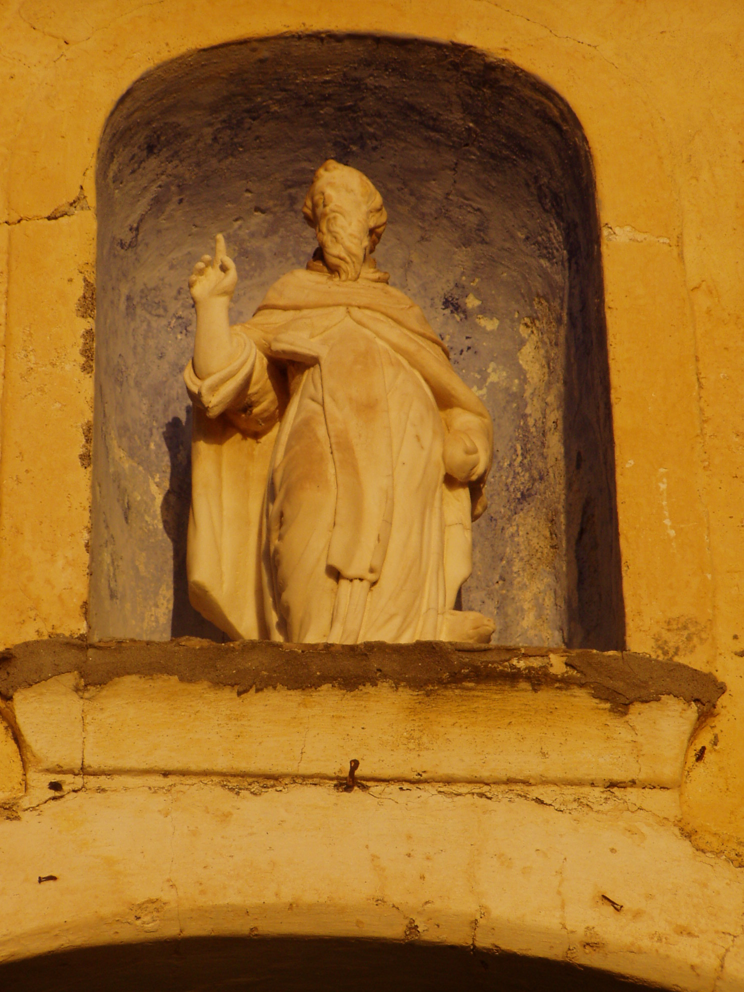 Statuina posta nell'Oratorio di Pieve Ligure